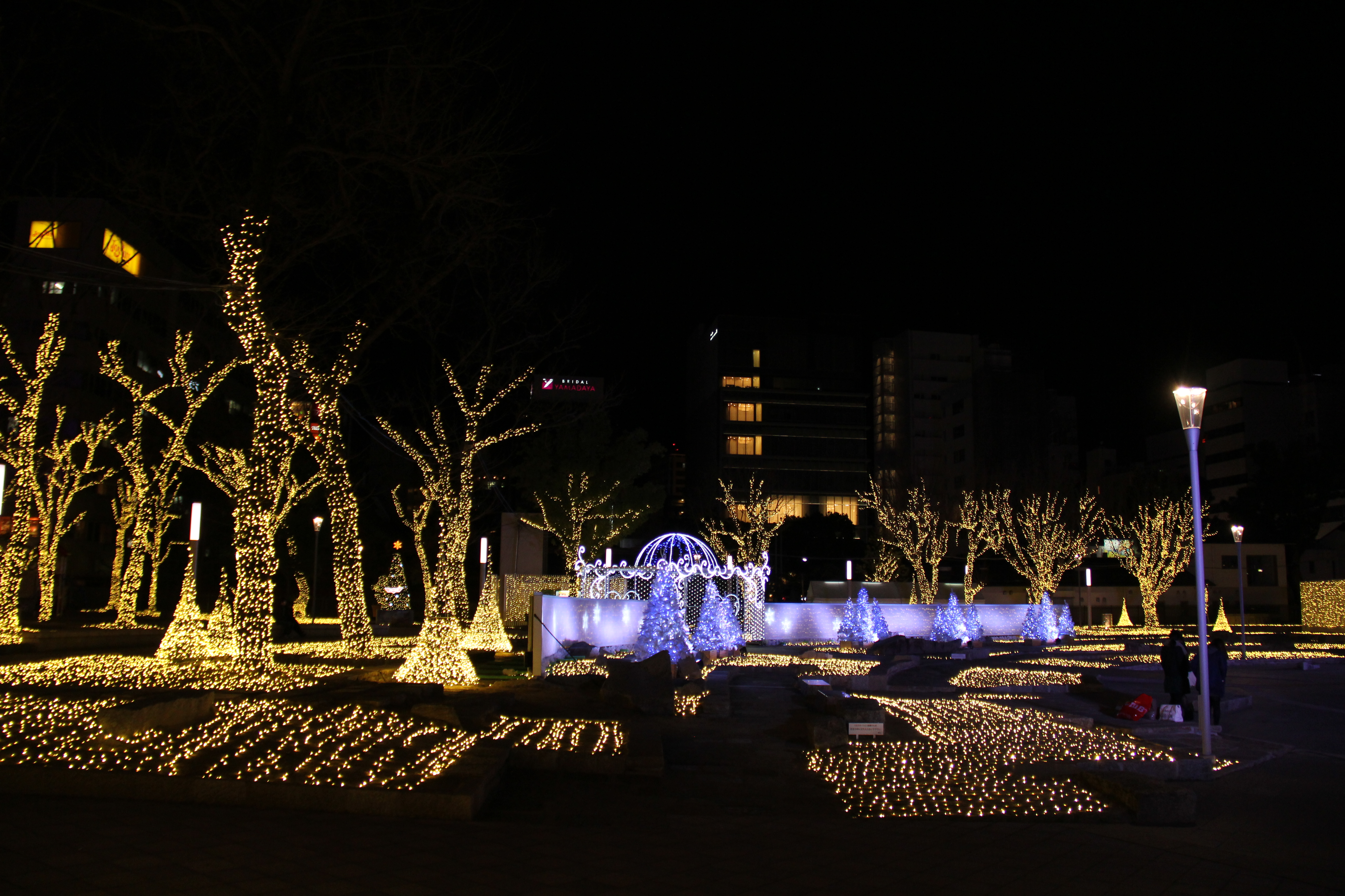 警固公園の冬期イルミネーション（2014年1月13日撮影） Canon EOS 60D